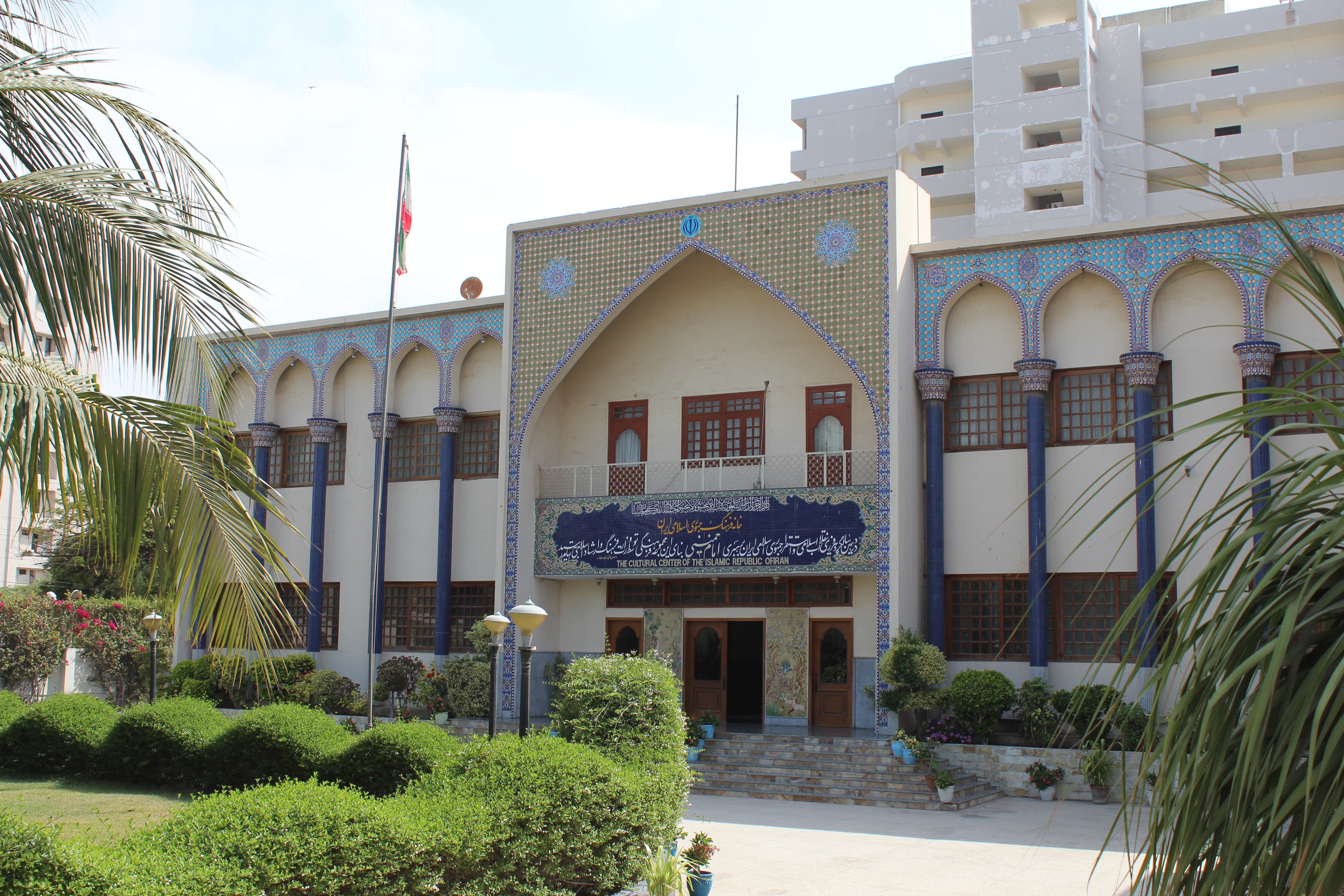 کراچی میں واقع خانہ فرہنگ جمہوری اسلامی ایران